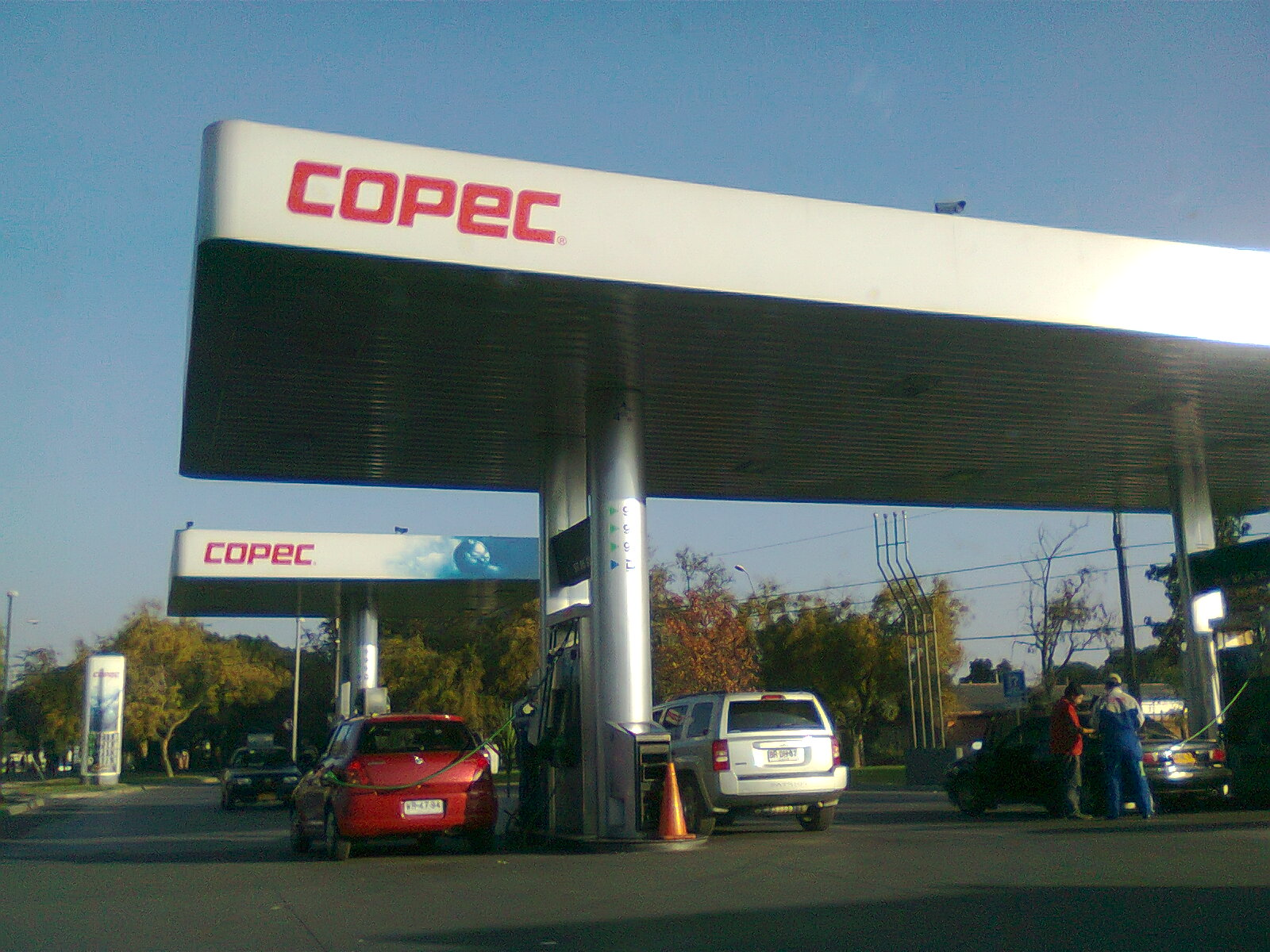 La estación de servicio COPEC ubicada en Huáscar 988, Maipú, Santiago de Chile.